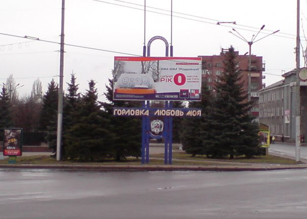 Horlivka info-stend